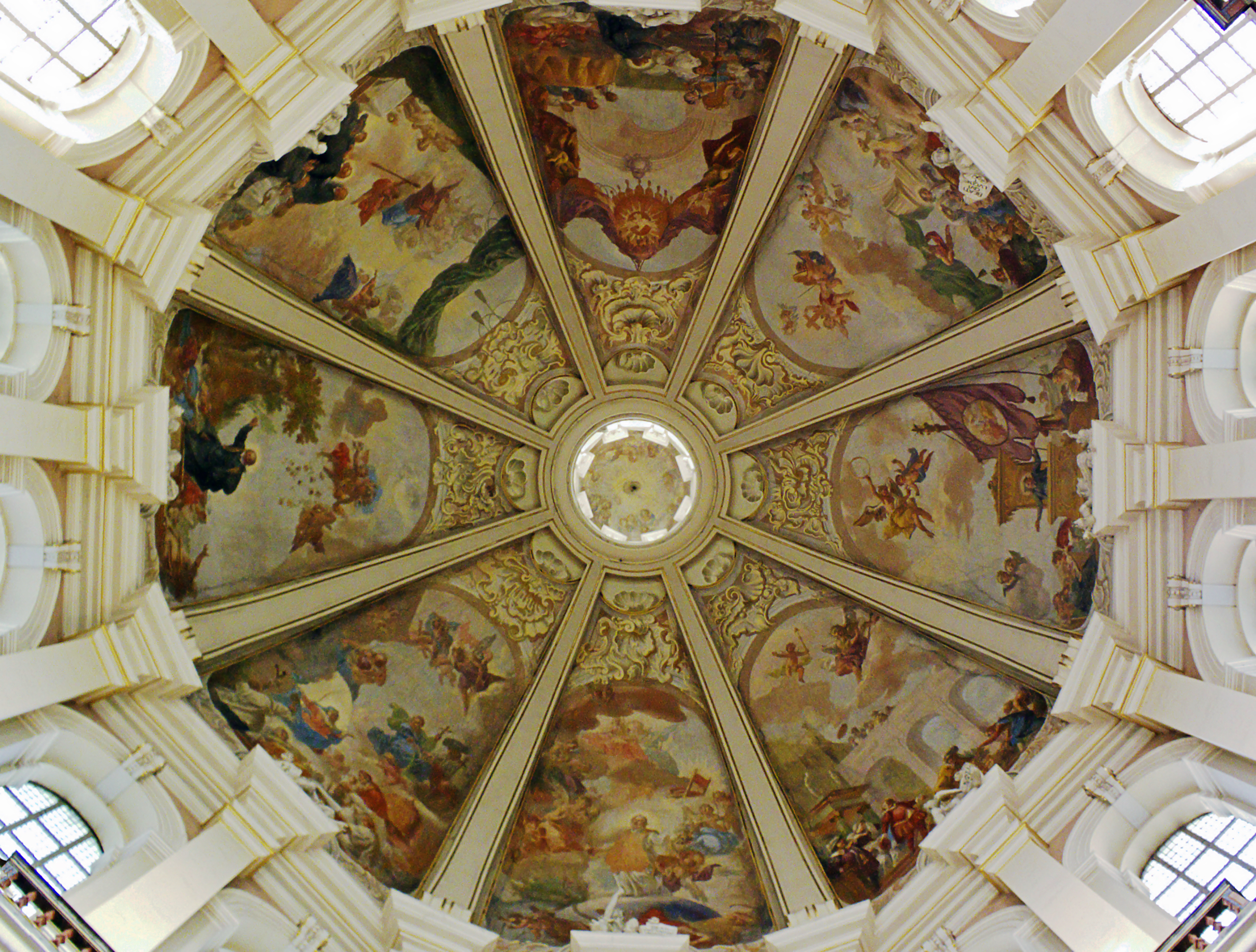 Głogówko; bazylika na Świętej Górze, freski na sklepieniu kopuły